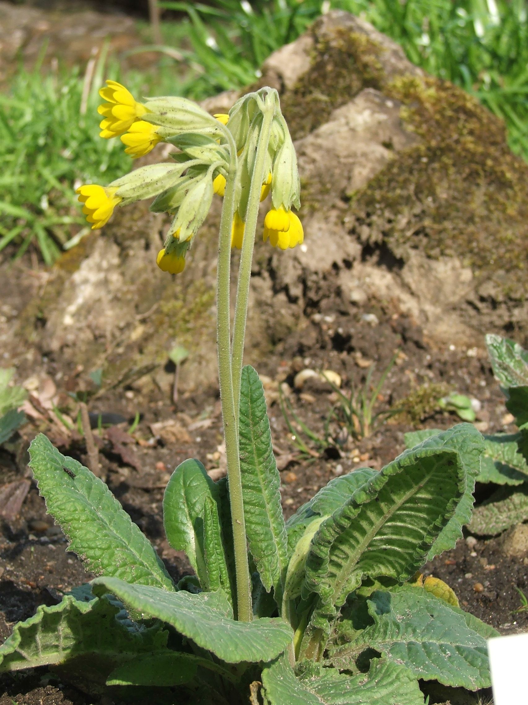 Primula veris subsp. columnae - MTA Botanic Garden Vácrátót, Hungary